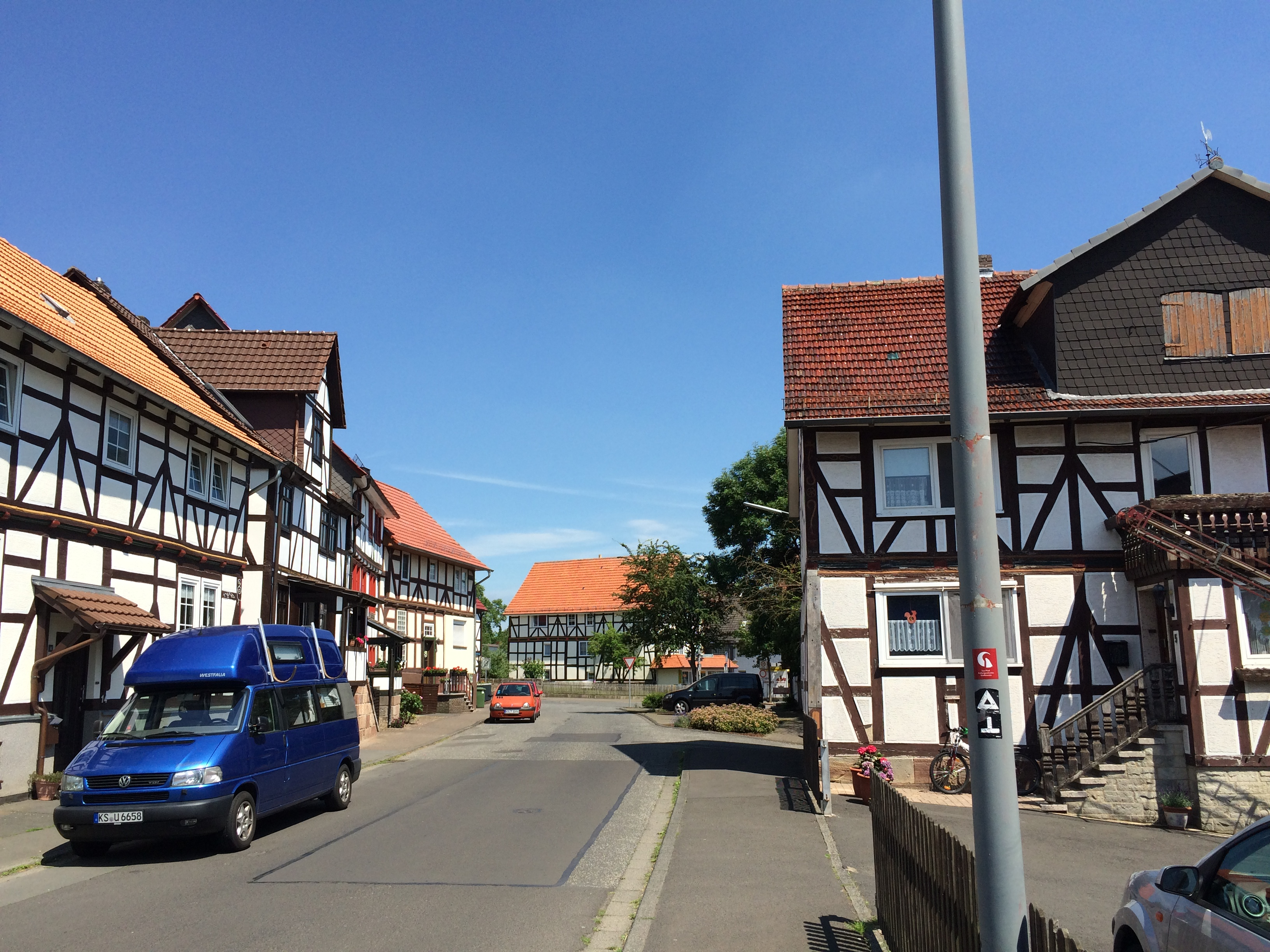 Die Wohngebietsstraße "Prinzenstraße" in Großenritte, Eco Pfad Kulturgeschichte Großenritte